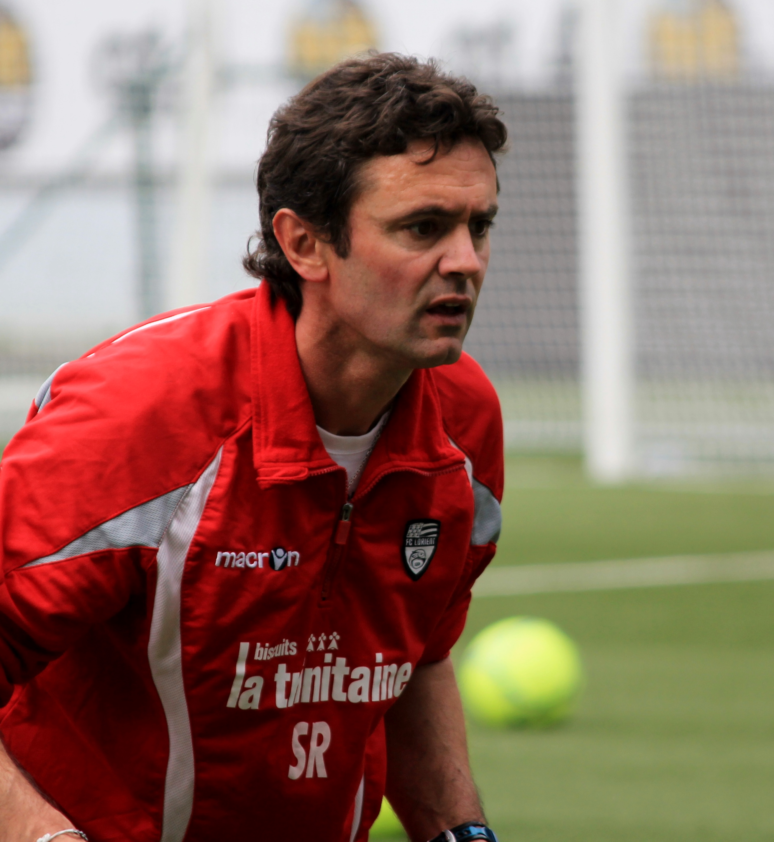 Sylvain Ripoll pendant un entrainement du FC Lorient le 24 mai 2013